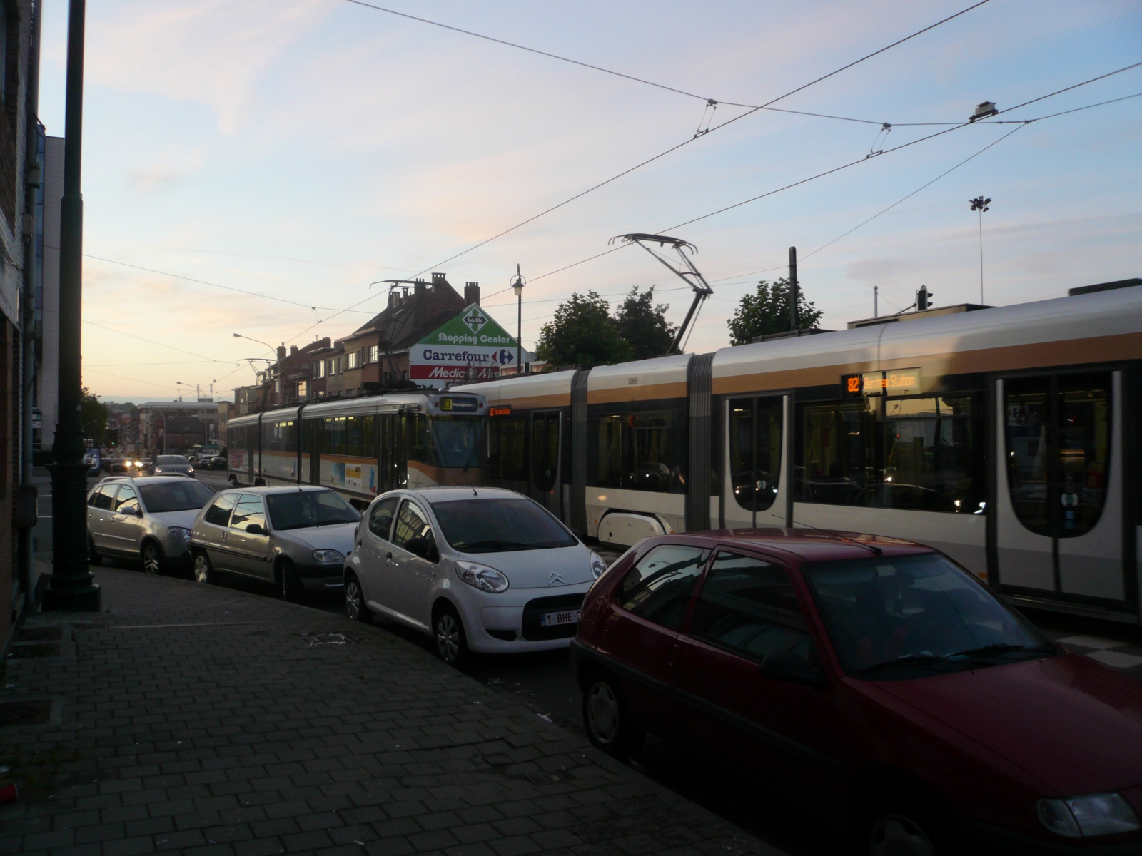 Tramway de Bruxelles - Le PCC 7912 sur la ligne 83 vers Montgomery croise la motrice 3069 sur la ligne 82 vers Berchem Station. (Autre photo)